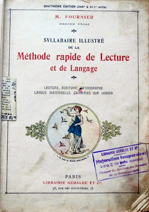 Mathieu Fournier, Syllabaire illustré, première édition en 1910.